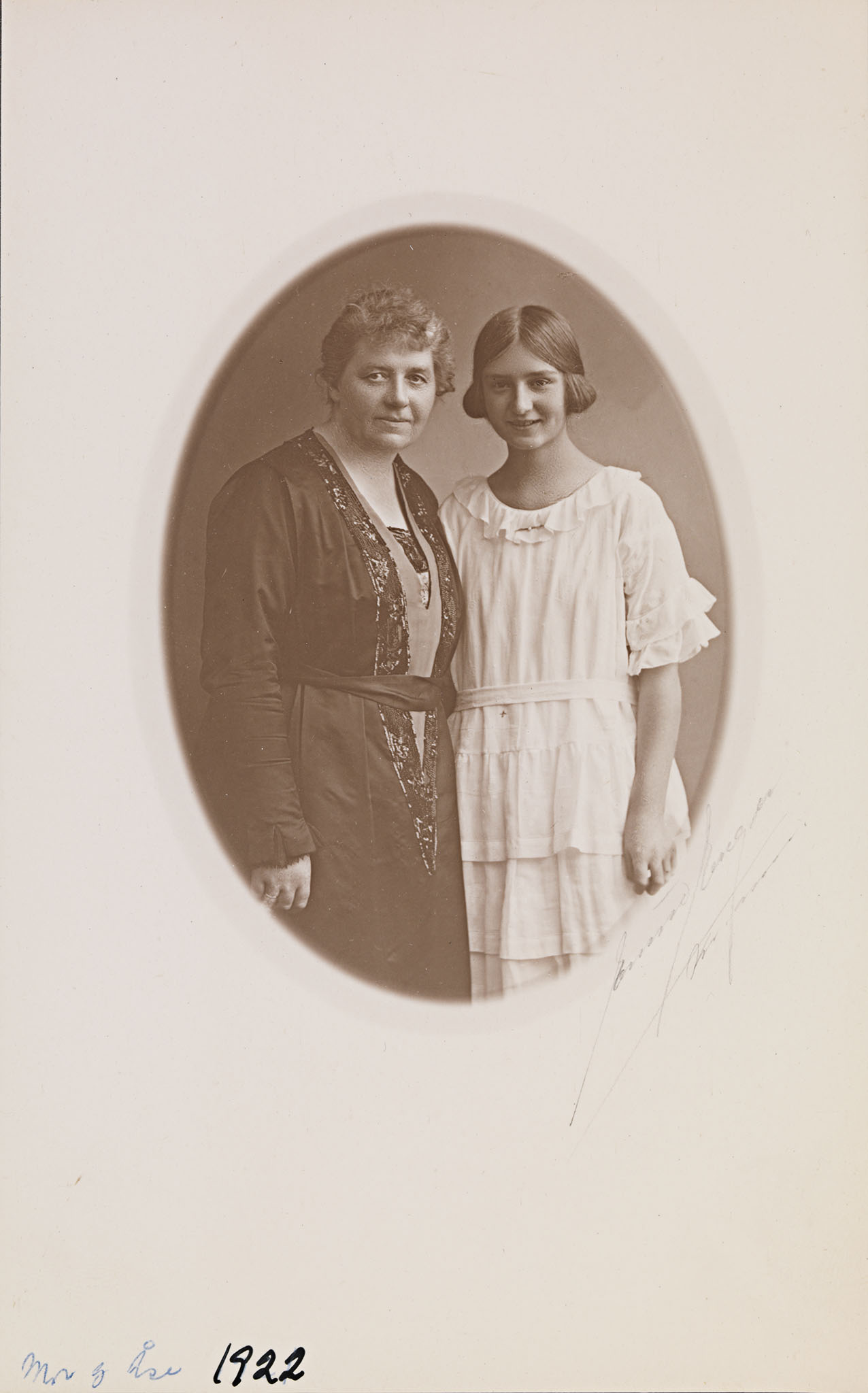 Tittel / Title: Portrett av Karen Grude Koht (1871-1960) og Åse Gruda Skard (1905-1985) Beskrivelse / Description: Karen Grude Koht var pedagog, essayist og kvinnesaksforkjemper. Åse Gruda Skard var psykolog. Dato / Date: 1922 Fotograf / Photographer: Eivind Enger (1876-1954) Sted / Place: Oslo Eier / Owner Institution: Nasjonalbiblioteket / National Library of Norway Lenke / Link: Bildesignatur / Image Number: bldsa_SKARD0343